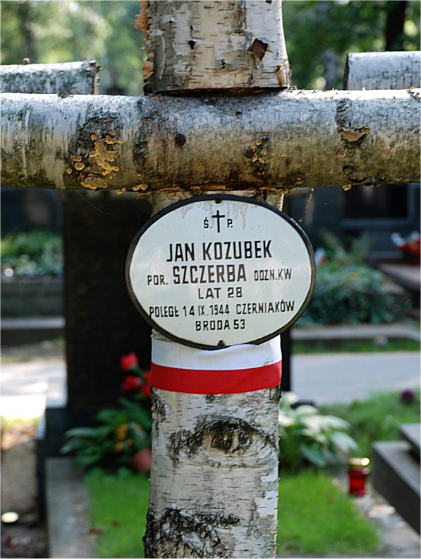 Jan Kozubek - grób na Powązkach wojskowych w Warszawie